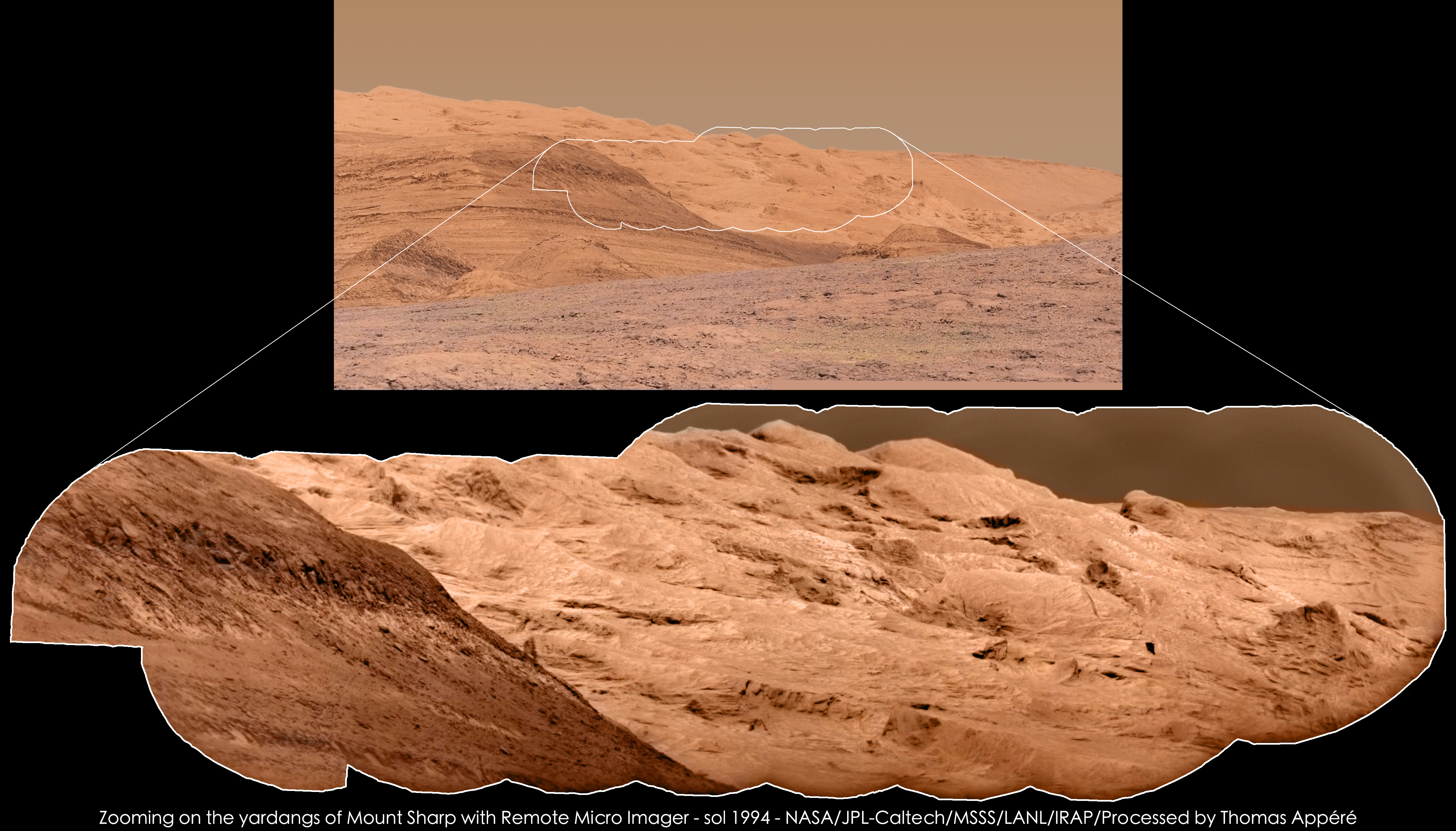 The Remote Micro Imager, part of ChemCam instrument, has imaged yardangs of Mount Sharp on sol 1994 at 12h00 local time. Yardangs are geologic structures carved by wind, observed in most Earth's deserts. Top image is a mosaic of 2 photos taken by the MastCam 100mm camera. Bottom image was obtained using the technique of pansharpening, i.e. the fusion of the RMI mosaic, providing details, and the MastCam 100mm image, providing colors. L'instrument Remote Micro Imager, qui fait partie de l'instrument ChemCam, a photographié les yardangs du Mont Sharp au sol 1994 à 12h00 heure locale.. Les yardangs sont des structures géologiques creusées par le vent, observées dans la plupart des déserts terrestres. L'image du haut est une mosaïque de 6 images acquises par la caméra MastCam 100 mm. L'image du bas a été obtenue grâce à la technique du "pansharpening", c'est-à-dire la fusion de la mosaïque RMI, qui fournit les détails, avec l'image MastCam 100 mm, qui apporte les couleurs.